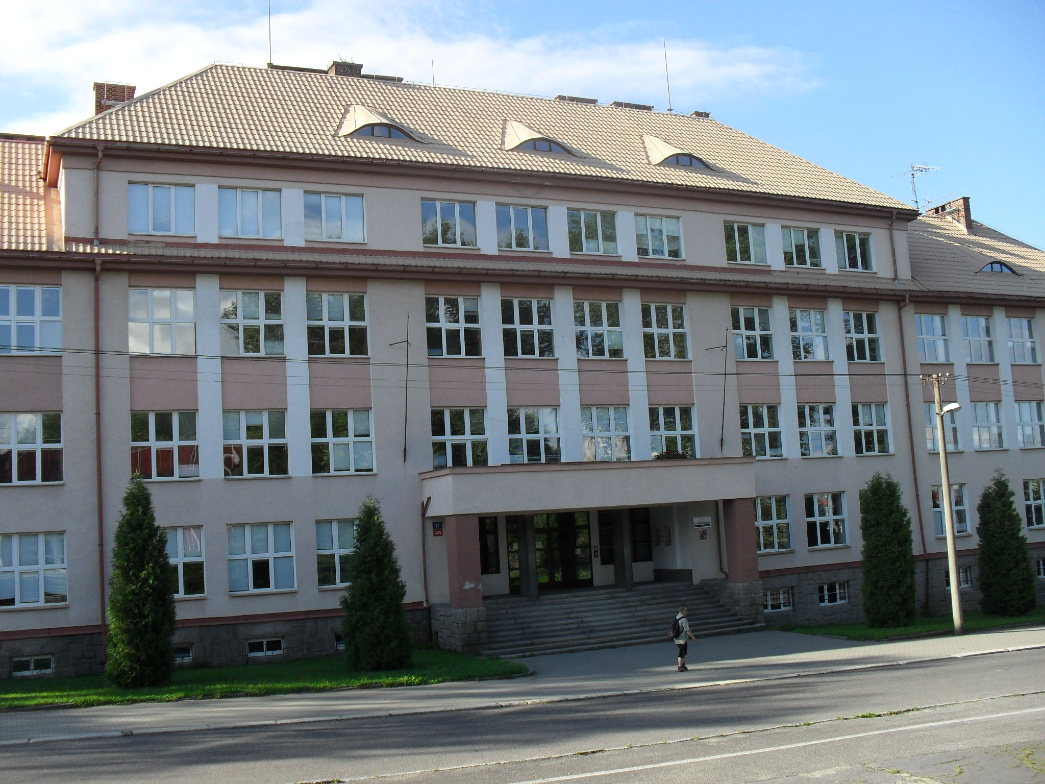 Budova gymnázia Jeronýmova